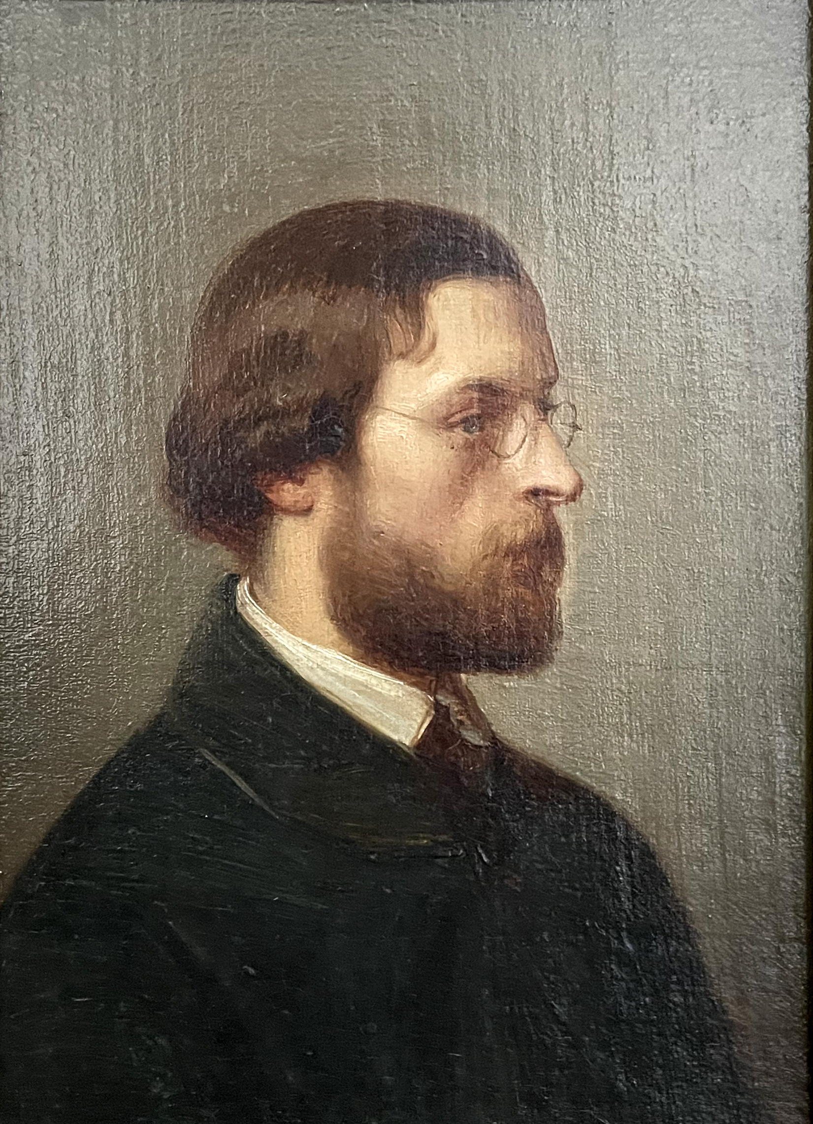 14 C. Müller Prf. - Porträt Karl Müller (1818–1893) - in Freundschaftsgalerie von Einzelbildnissen der Düsseldorfer Malerschüler und ihren Freunden (Vermächtnis des Künstlers)